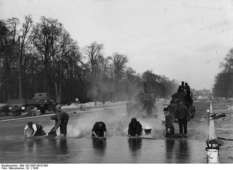 Berlin, Asphaltarbeiten Scherl: Auftragen der Asphaltdecke in der Charlottenbuger Chaussee [in Berlin]. Fotograf.: Dr. Weinsheimer 5018-38